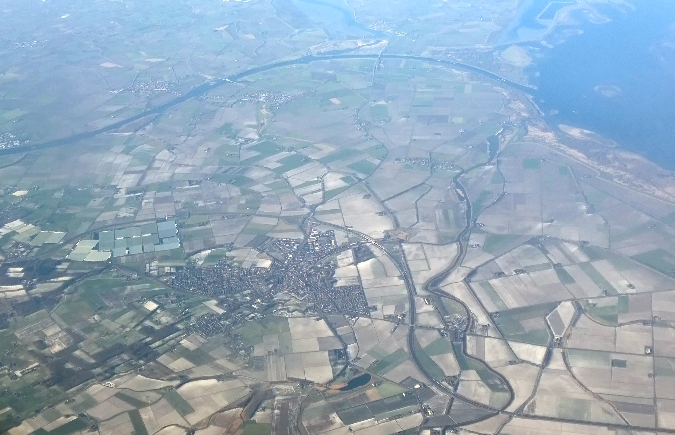 Steenbergen, gezien naar het Westen. Januari 2015